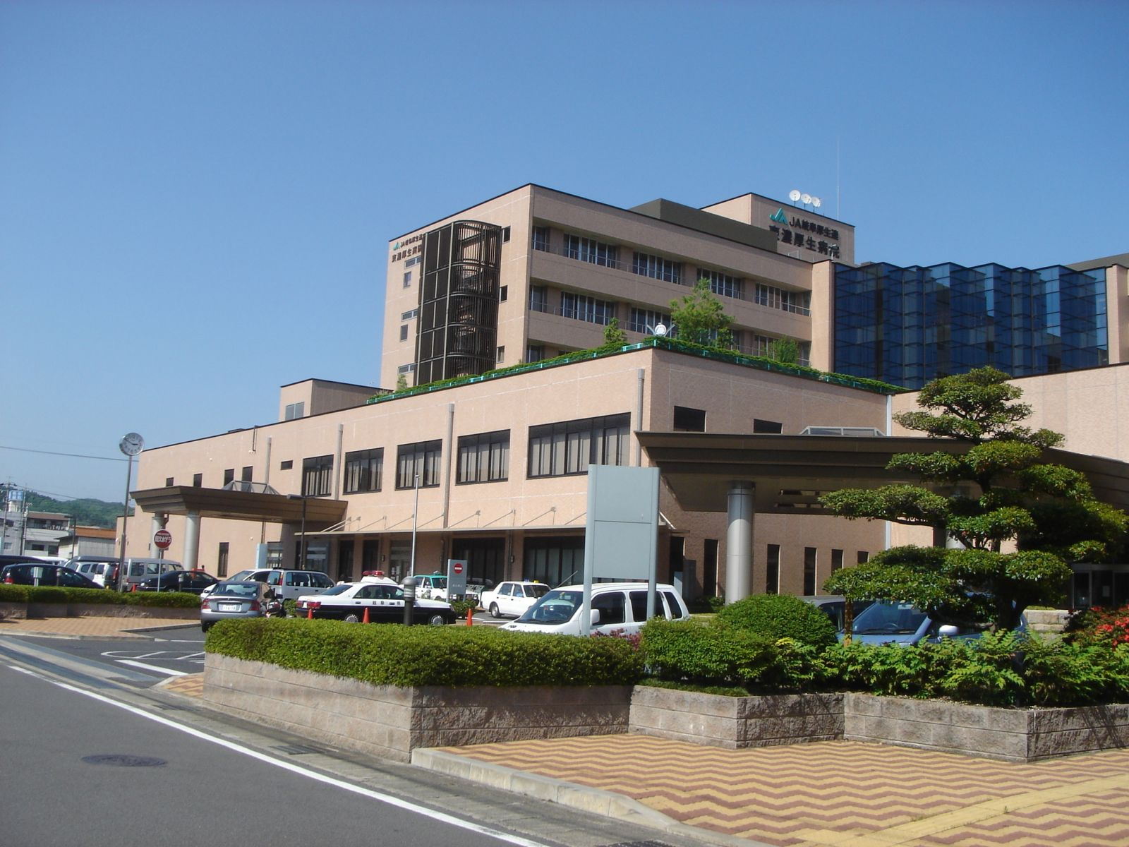 Tono Kosei Hospital（東濃厚生病院）,Mizunami,Gifu,Japan(岐阜県瑞浪市)で撮影。